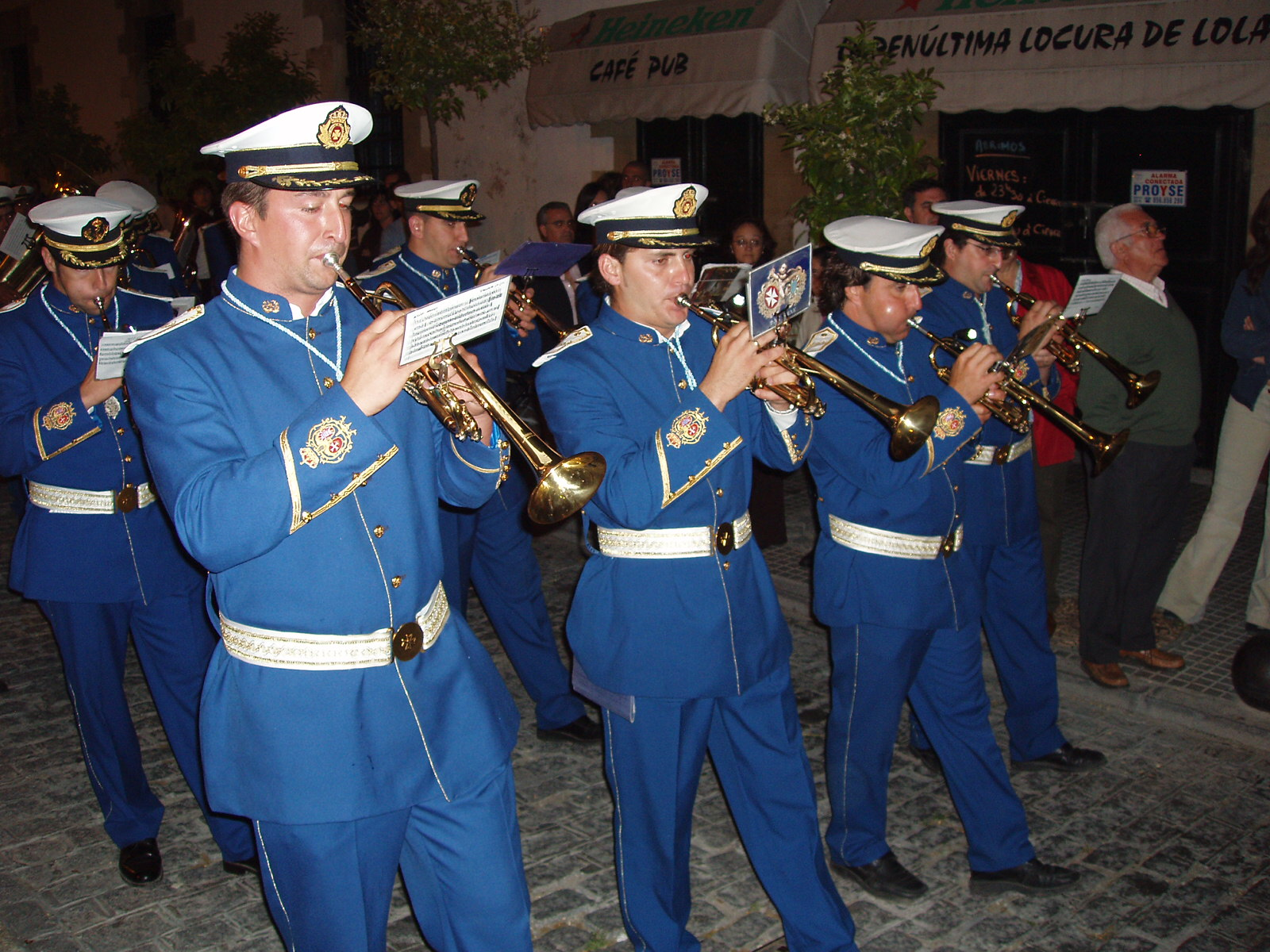 Banda de música de La Borriquita. Domingo de Ramos. Semana Santa en El Puerto de Santa María, Cádiz, España.